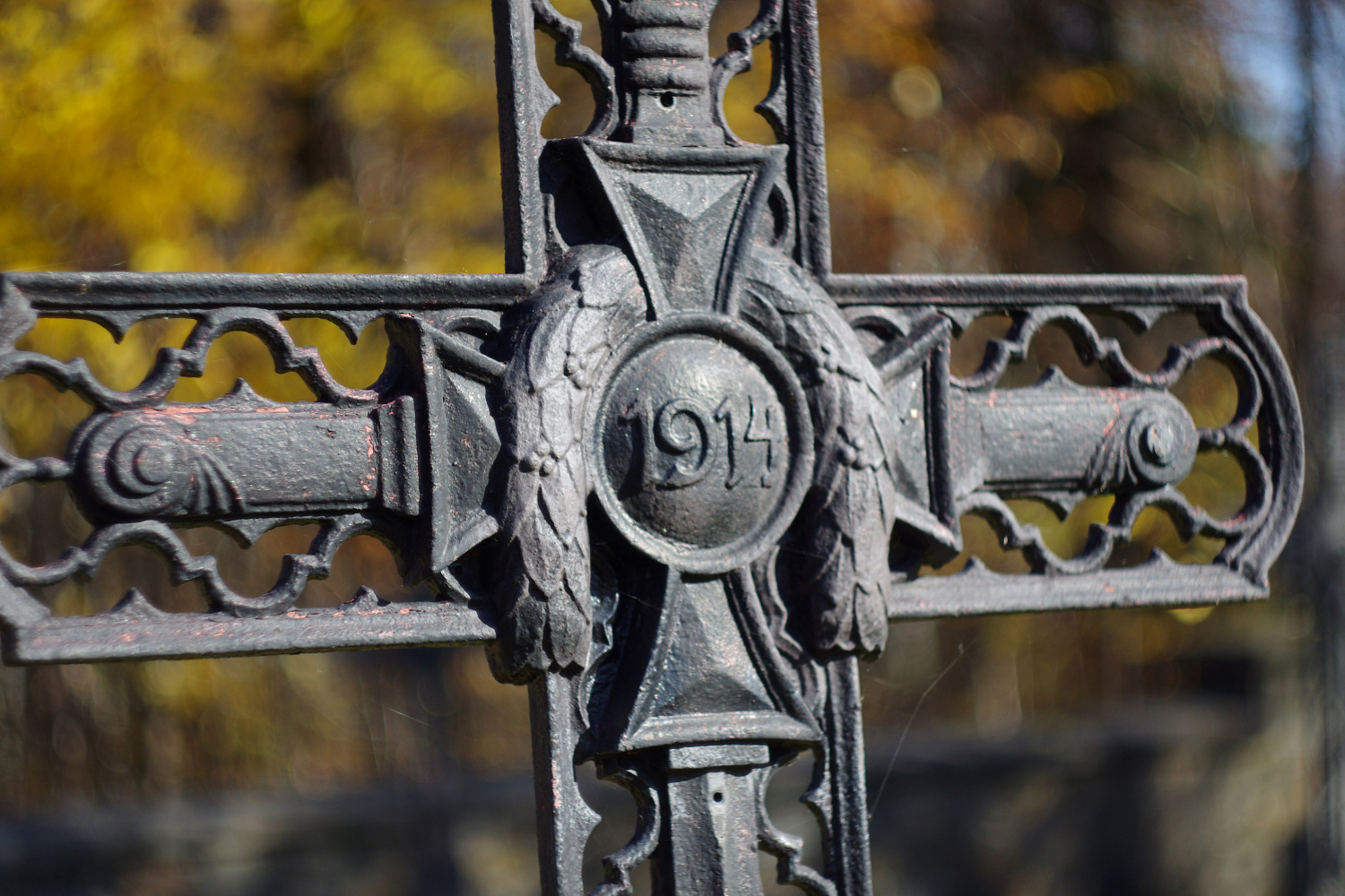 Cmentarz wojenny nr 341 - Sobolów-Zonia